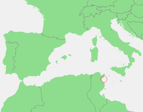 In dutch: Locatie Golf van Hammamet.PNG